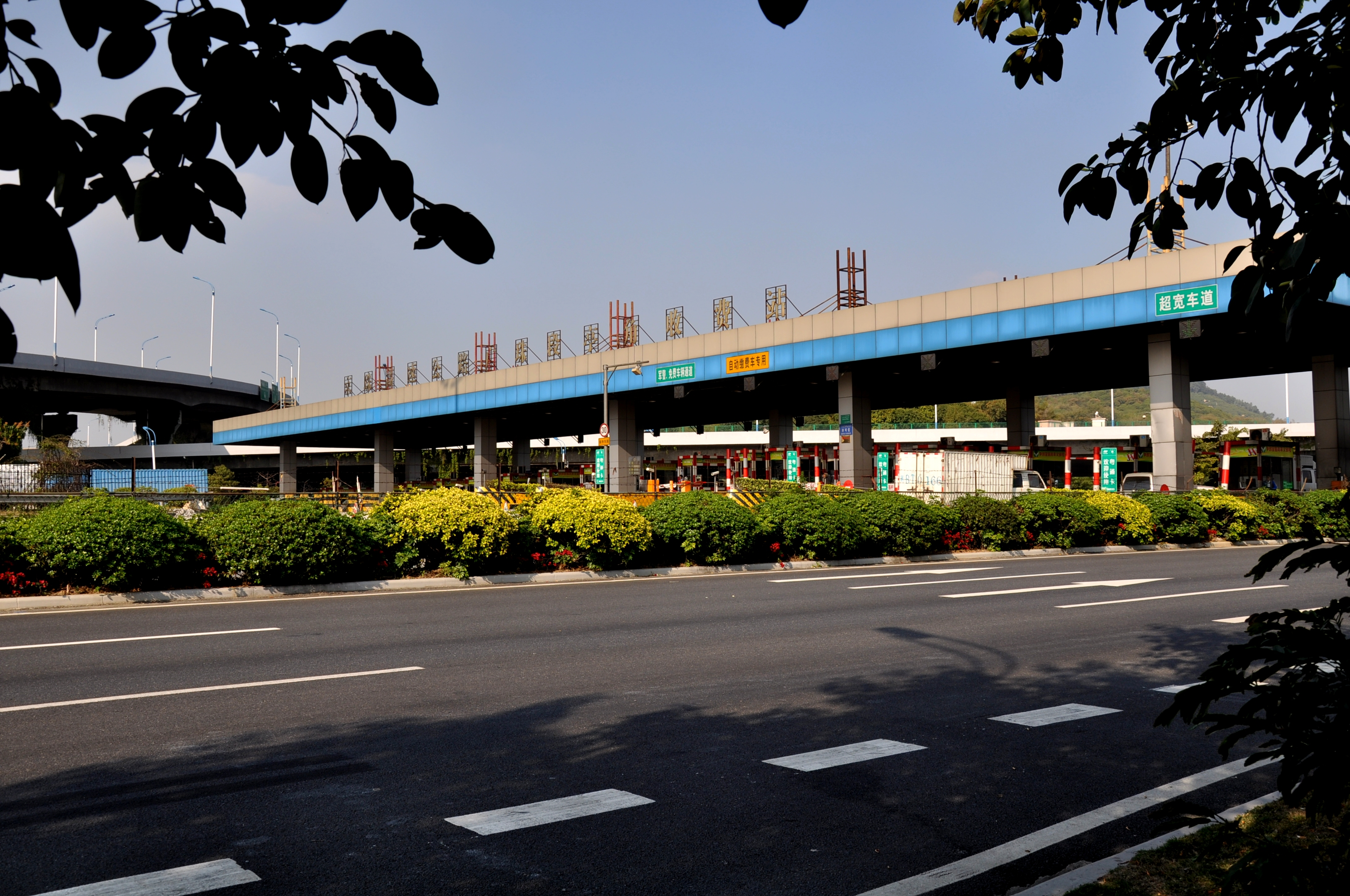 京珠高速公路亭角收费站